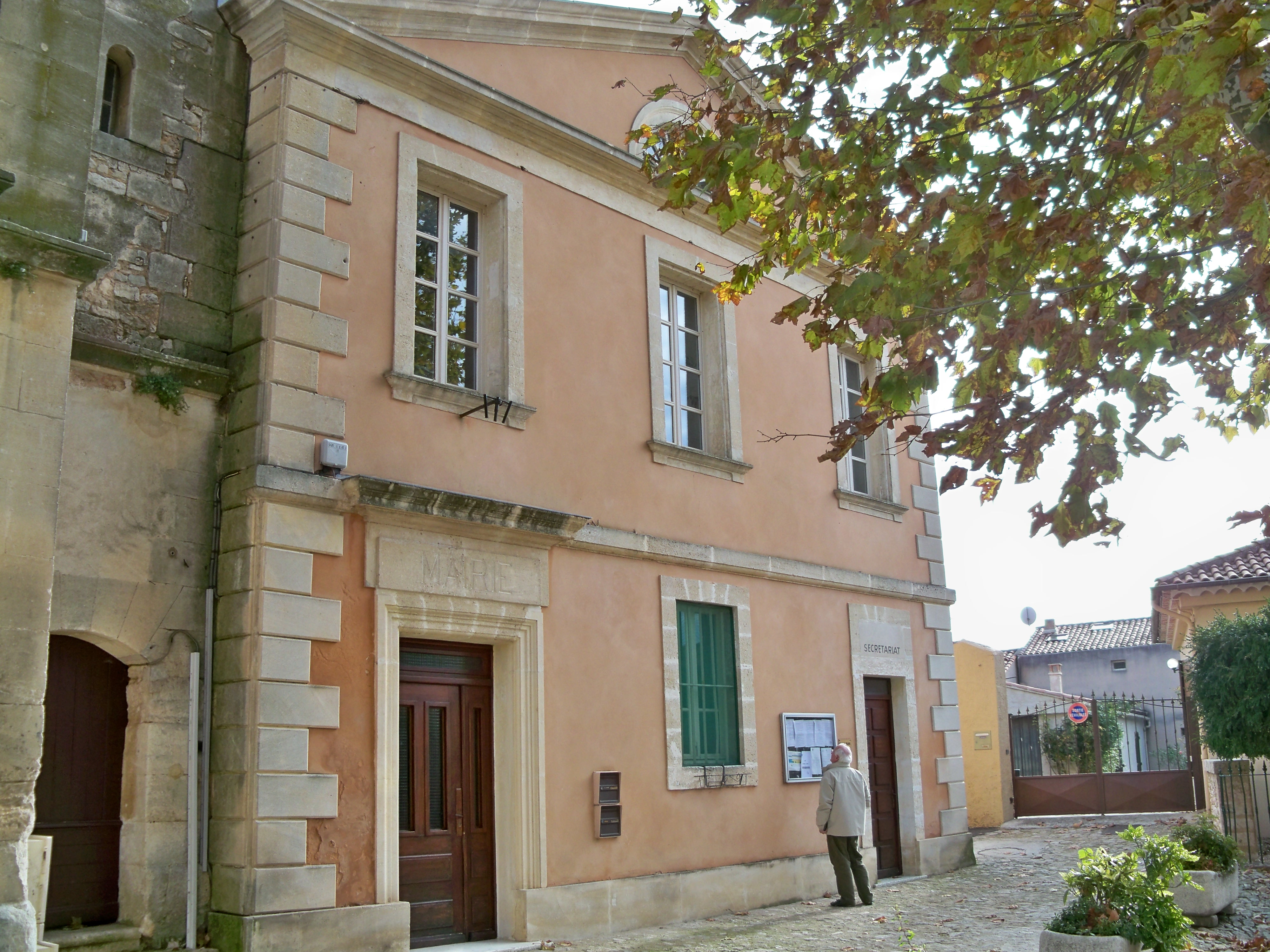 Mairie de Villars, Vaucluse, France